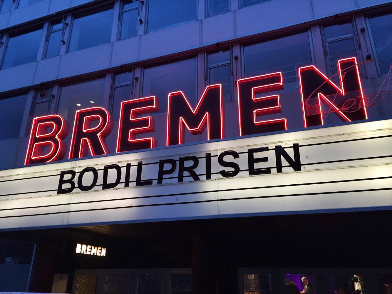 Bremen Teater - Bodilprisen 2016